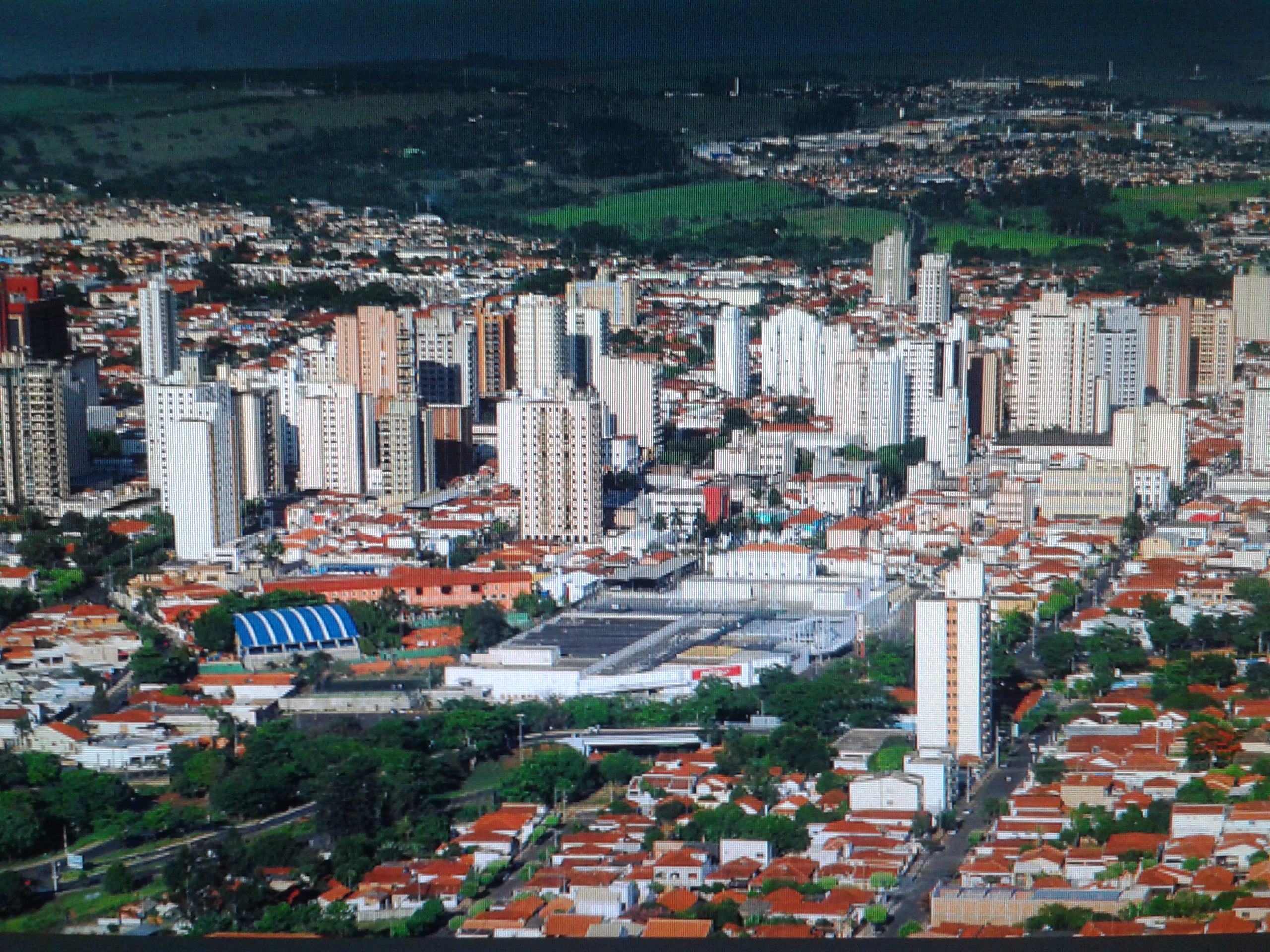 Edifícios centrais de Catanduva